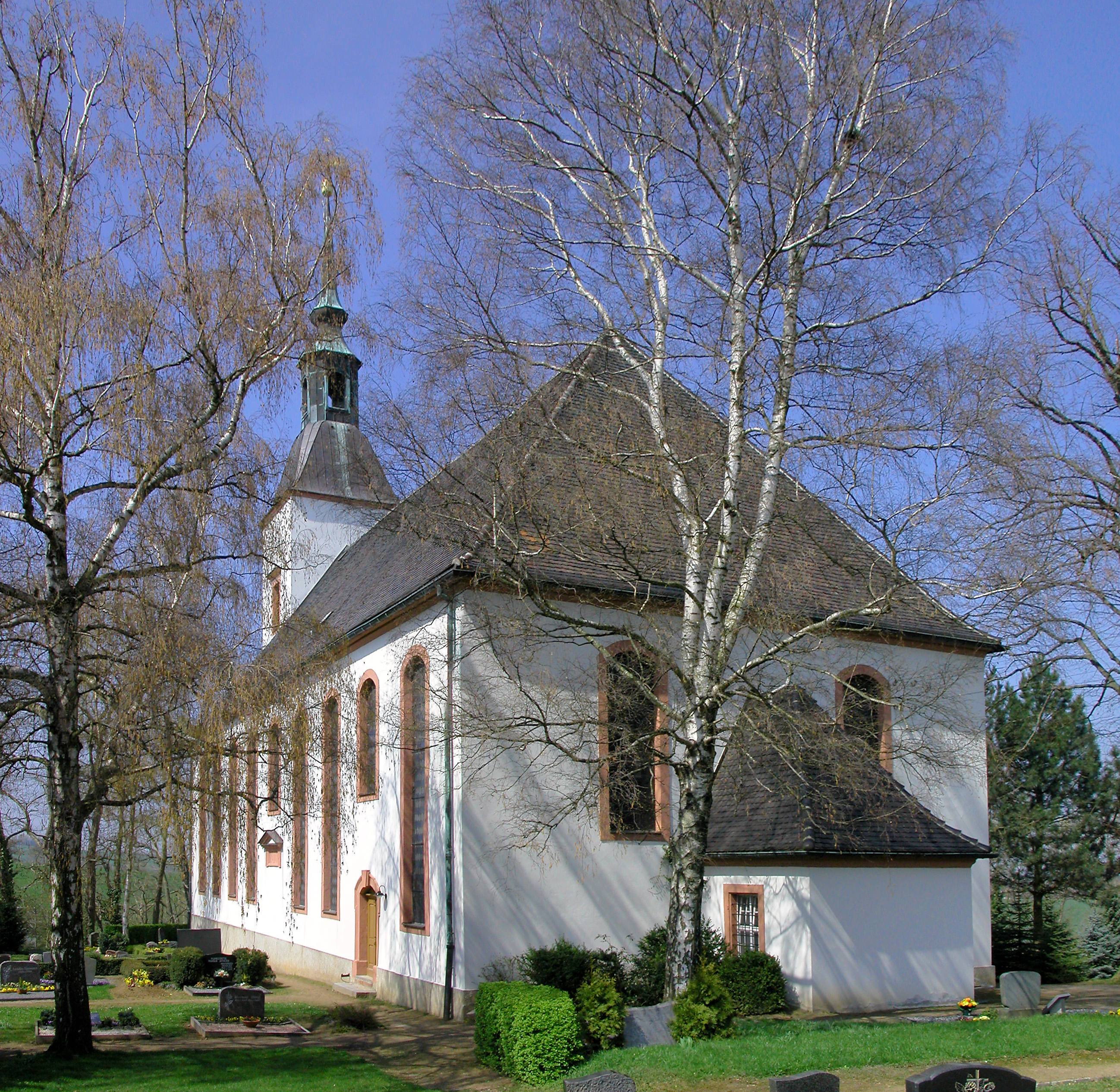 17.04.2010 04746 Gersdorf (Hartha), Kirchberg (GMP: 51.124864,12.938938): Dorfkirche. Ihr Ursprung geht auf die Kolonisationszeit zurück. Die alte Dorfkirche brannte mehrfach ab, doch konnten jeweils Teile der Ausstattung gerettet werden. Das jetzige Kirchengebäude wurde 1801 bis 1805 errichtet. Die Bauausführung lag bei Zimmermeister Johann Gottlieb Ilgen, dem Pächter der Kriebsteiner Mühle. Sicht von Südosten. [DSCN41279-41280.TIF]20100417160MDR.JPG(c)Blobelt